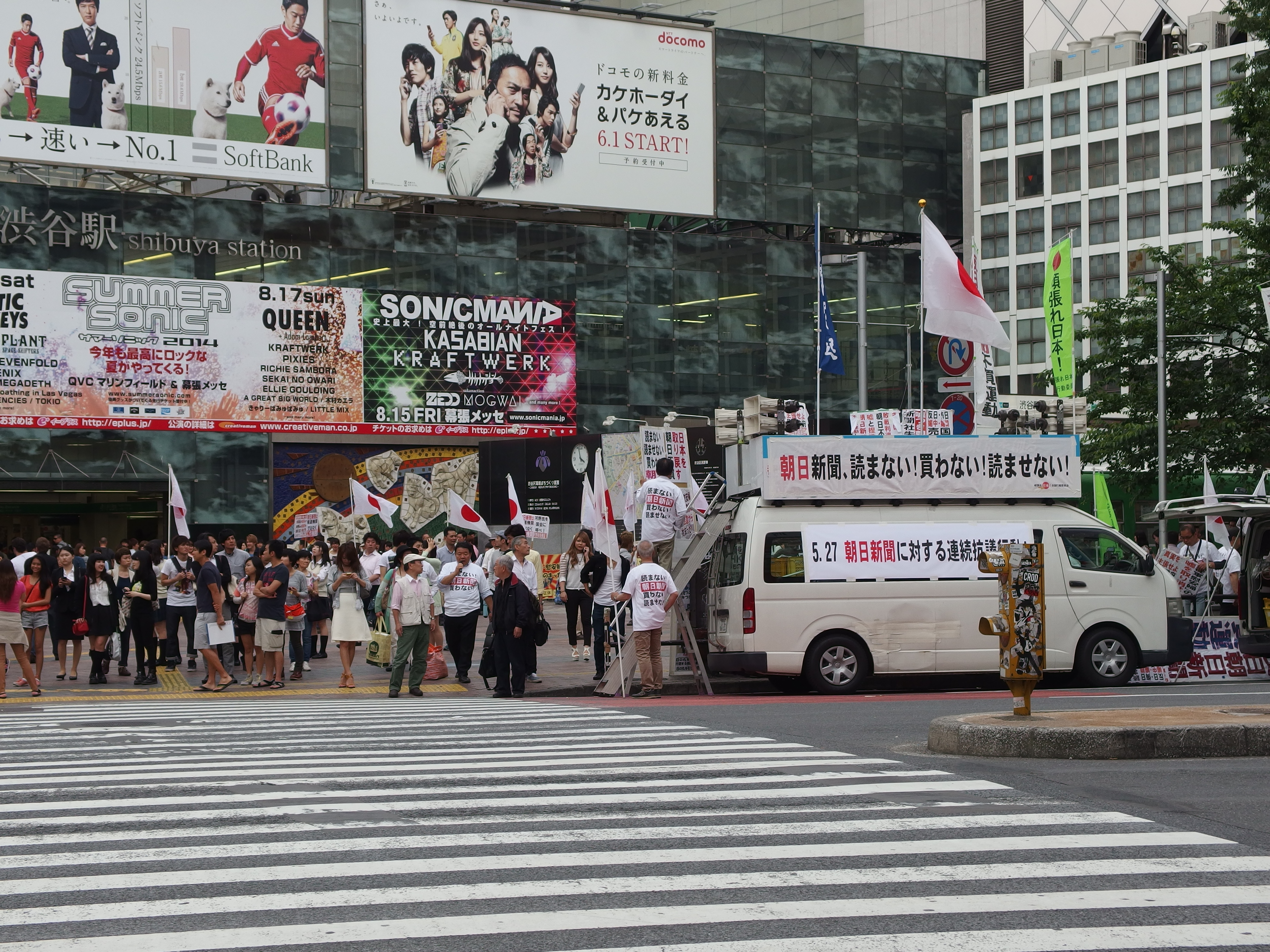 朝日新聞の不買を呼びかける、頑張れ日本!全国行動委員会